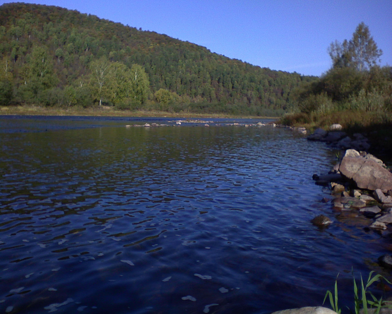 Инзер рядом с Зуяково